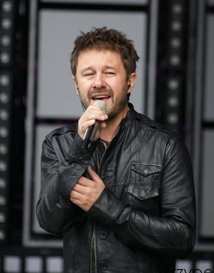 Piasek @ 46. KFPP in Opole.